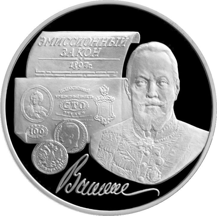 Монета Банка России — 100-летие эмиссионного закона Витте, 3 рубля реверс